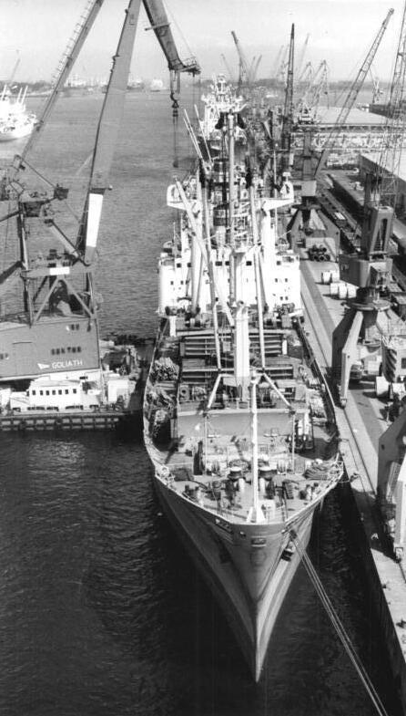 Rostock, Überseehafen, Frachter, Schwimmkran "Goliath" ADN-ZB Sindermann 1.8.88-pst - Rostock: Hafen Mehr als 2.000 Schiffe machten seit Jahresbeginn an den 43 Liegeplätzen des Rostocker Überseehafens fest. Über elf Millionen Tonnen Güter konnten im gleichen Zeitraum umgeschlagen werden. Die Werktätigen des Seehafens und ihre zahlreichen Kooperationspartner schufen damit beste Voraussetzungen für einen Güterumschlag von über 20 Millionen Tonnen, dem zweitbesten Umschlagergebnis in der Geschichte des Hafens.